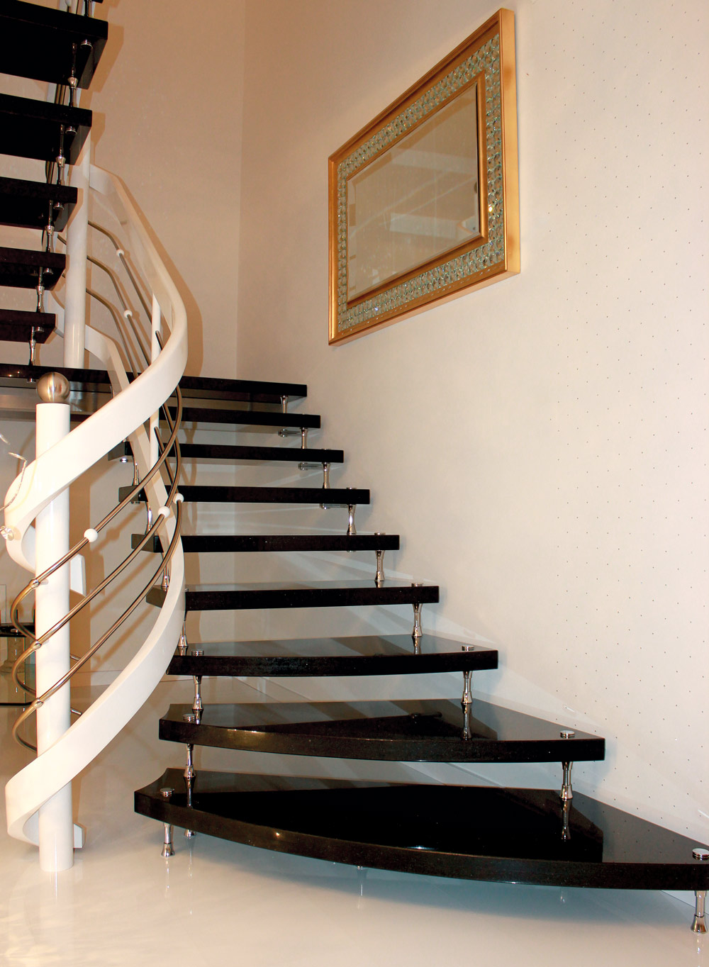 Freitragende Bolzentreppe mit Granitstufen Nero Assoluto, Hersteller: Klepfer-Naturstein